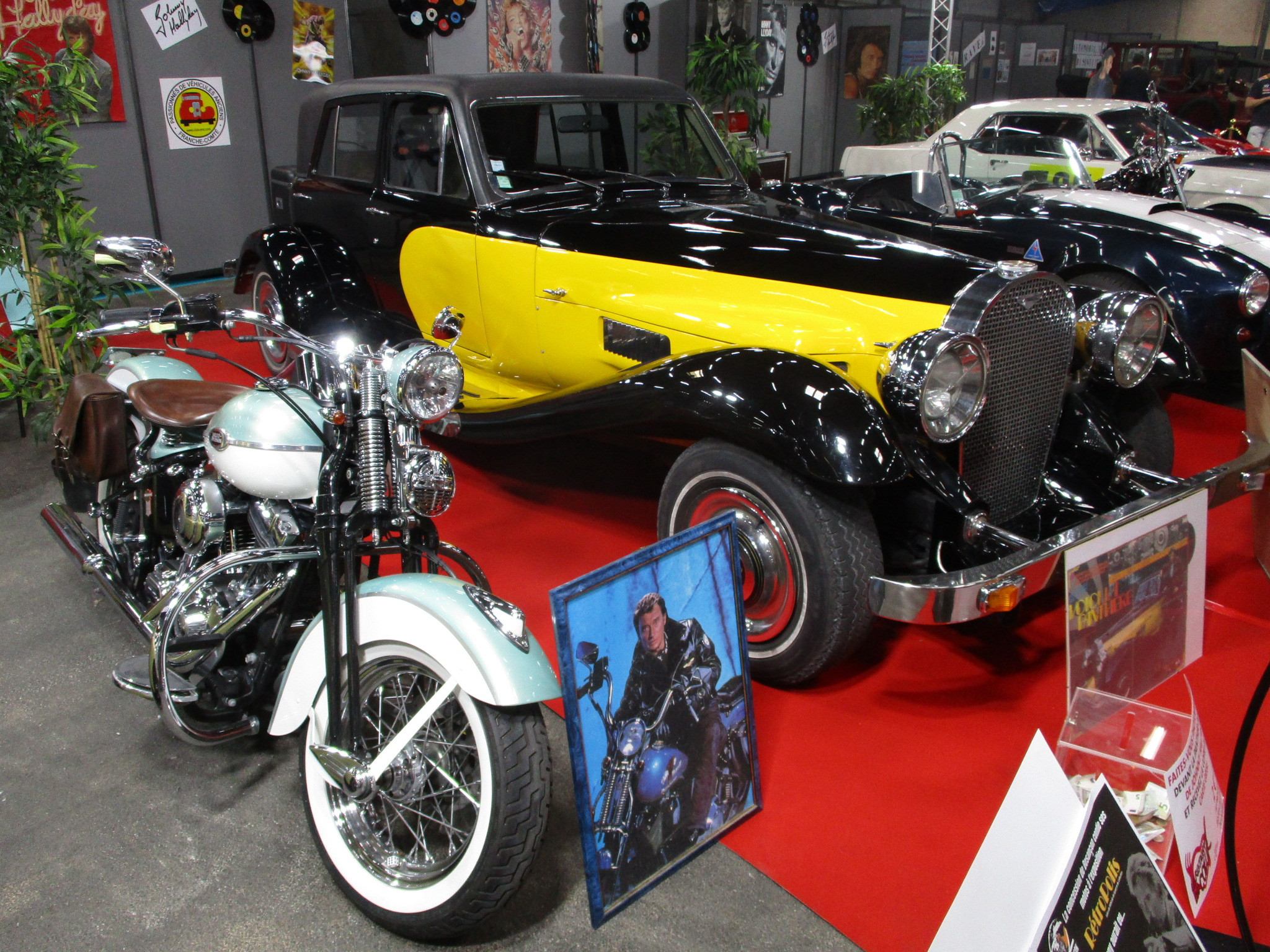 Panther De Ville et Harley-Davidson et (Johnny Hallyday)